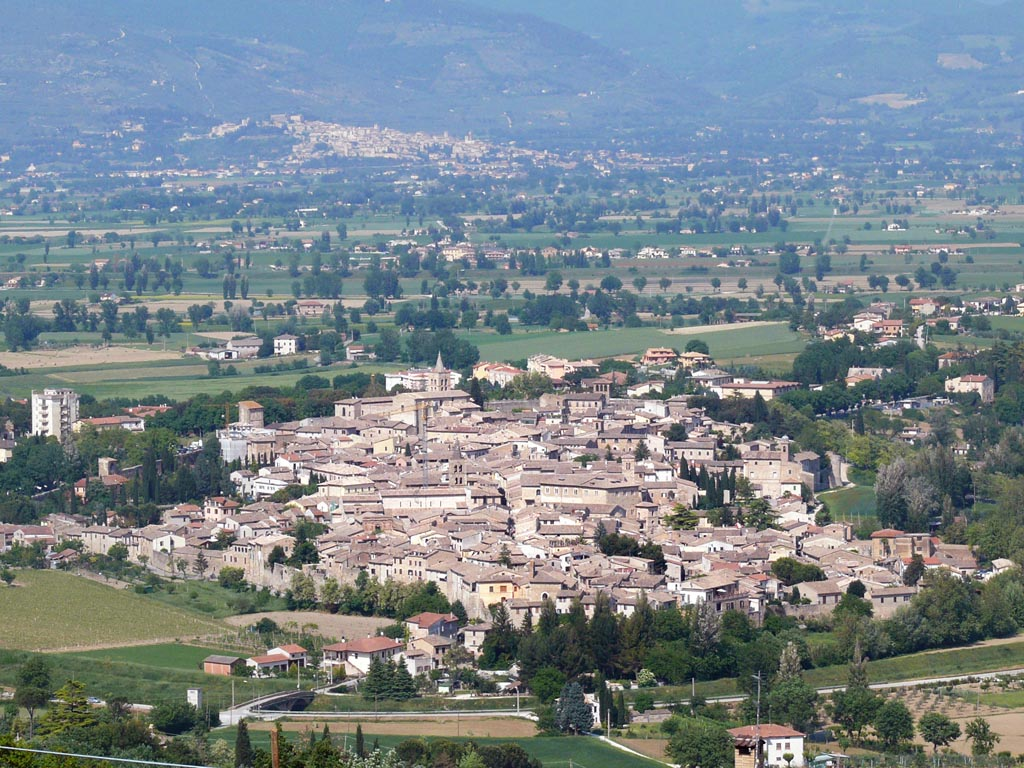 Bevagna, view